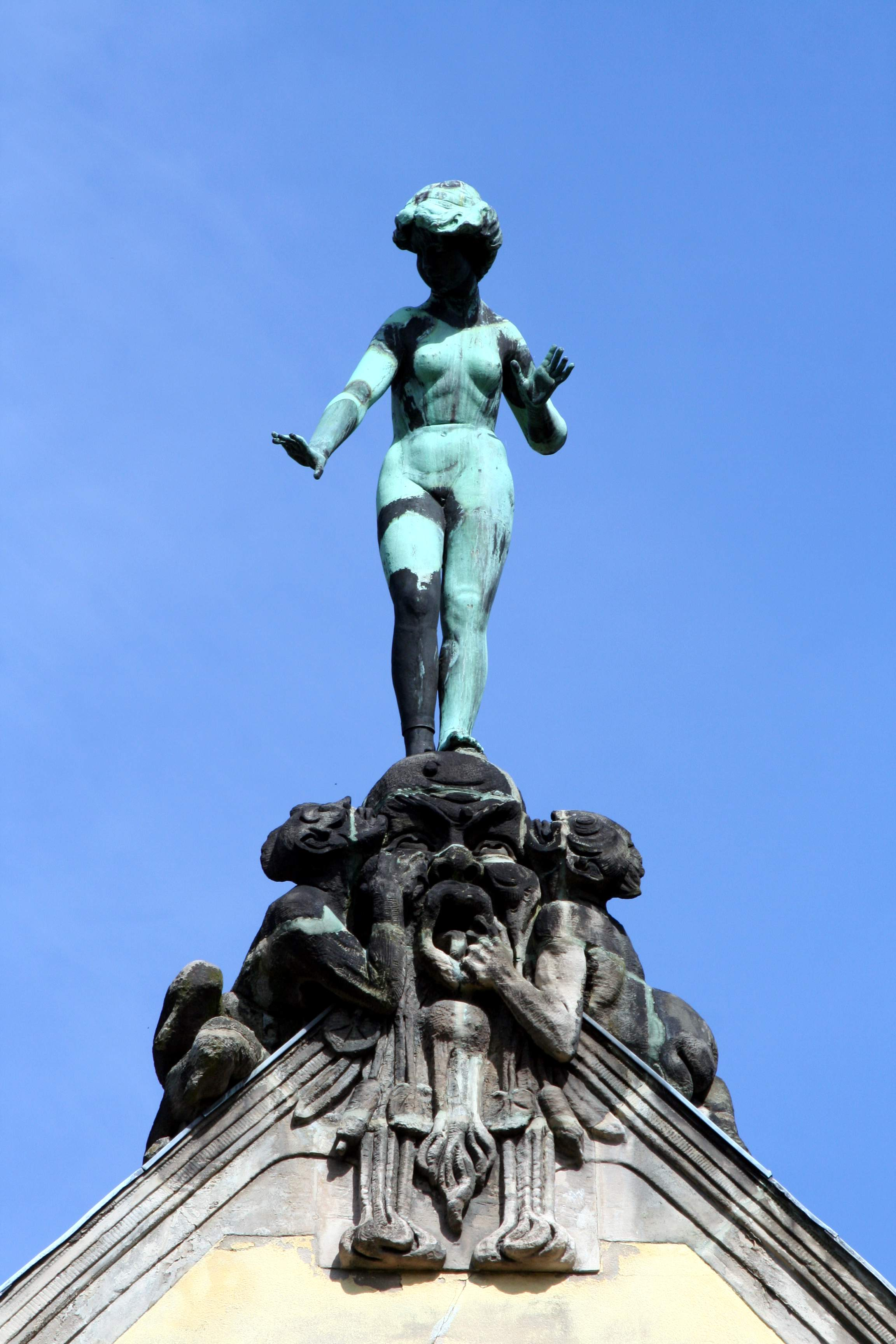 Ernst-Alexandrinen-Volksbad in Coburg, Bronzefigur einer Badenden von Otto Poertzel (1907)